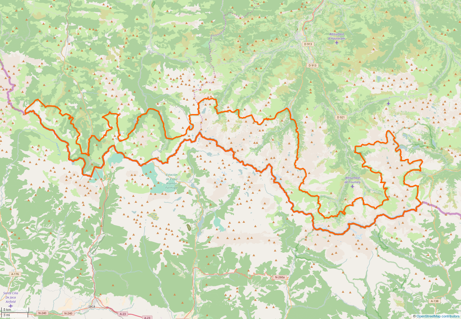 Périmètre du coeur de parc du Parc national des Pyrénées.